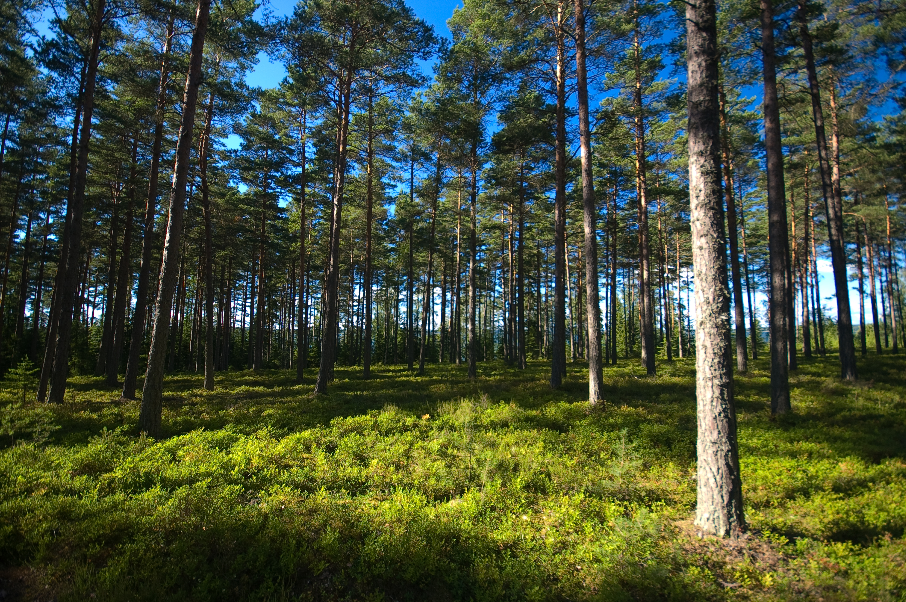 Metsä Kemiössä